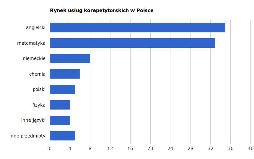 Rynek uslug korepetycje w Polsce